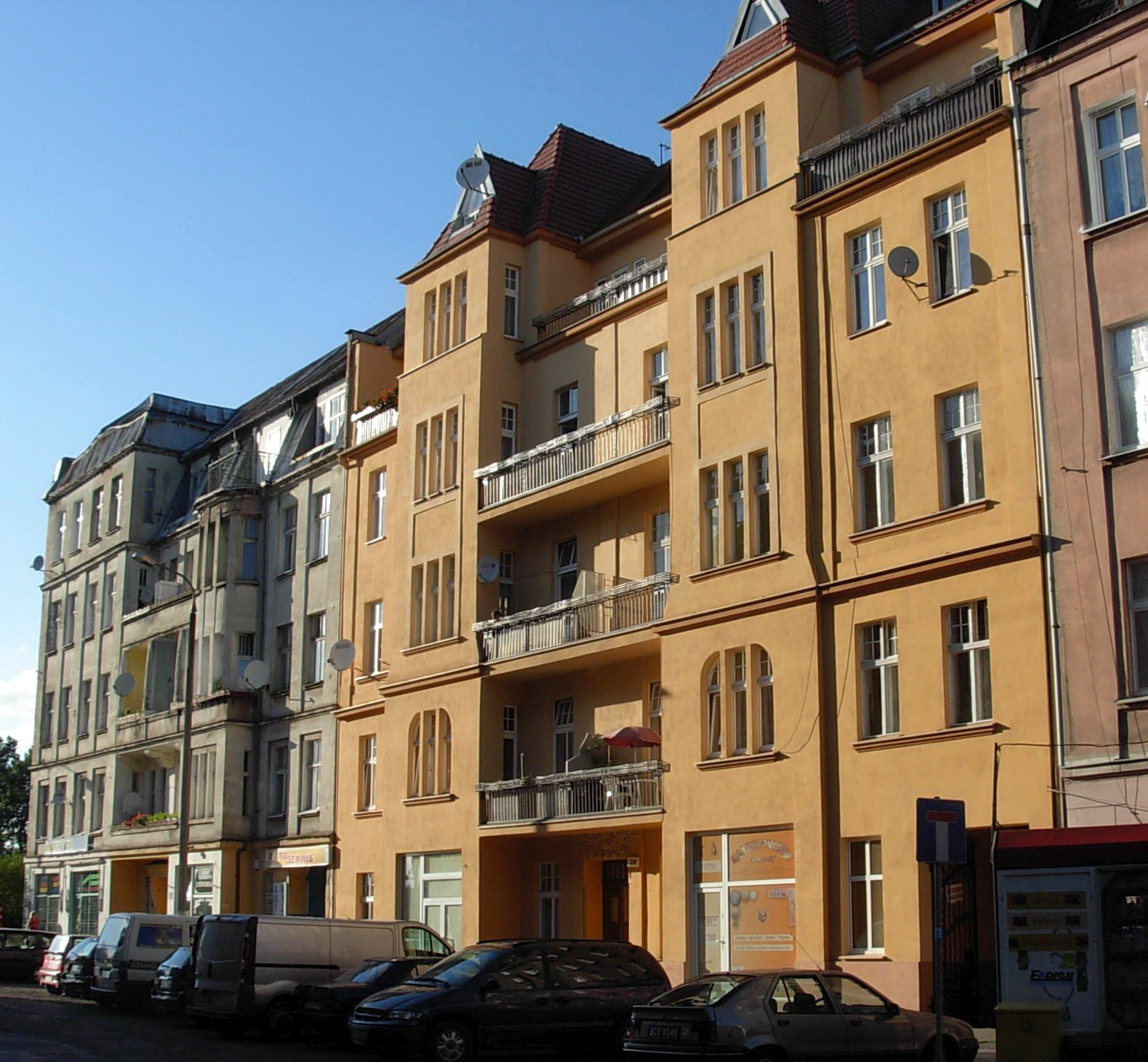 Kamienica modernistyczna ul. Św. Trójcy 28 w Bydgoszczy